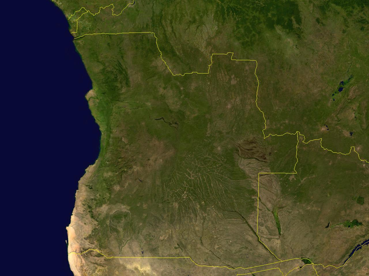 Angola